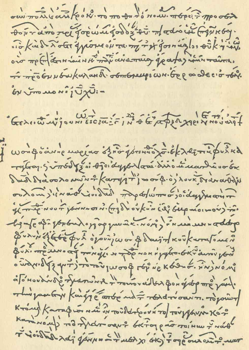 Колофон с датировкой рукописи, содержащий текст «Дидахе». 1056 год (Hieros. Patr. 54. Fol. 120)